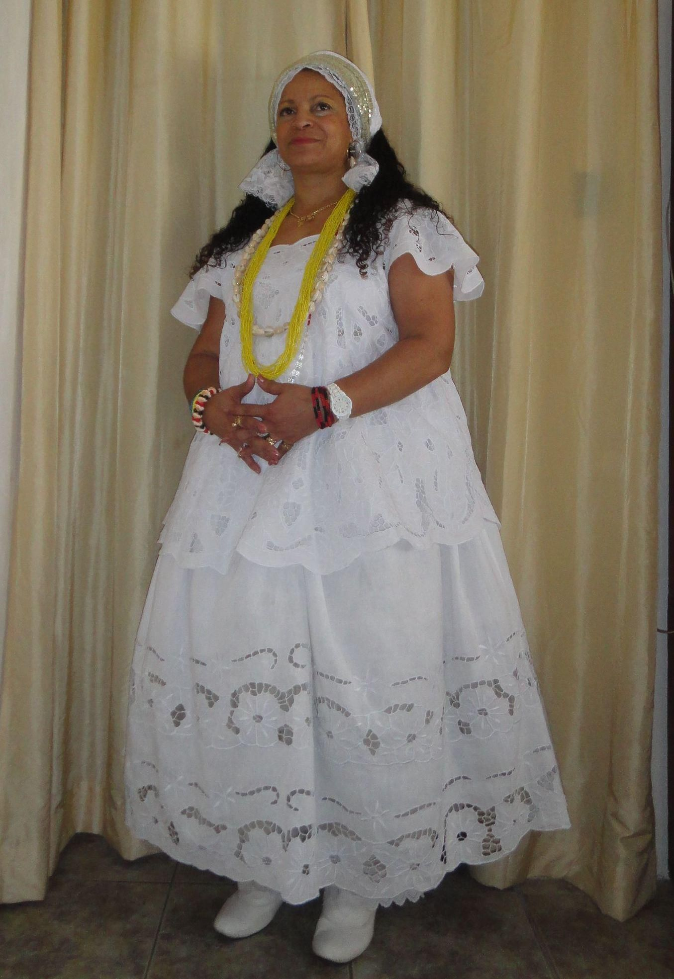 Religiosa afroumbandista uruguaya, activista afro, política, periodista, escritora, procuradora.